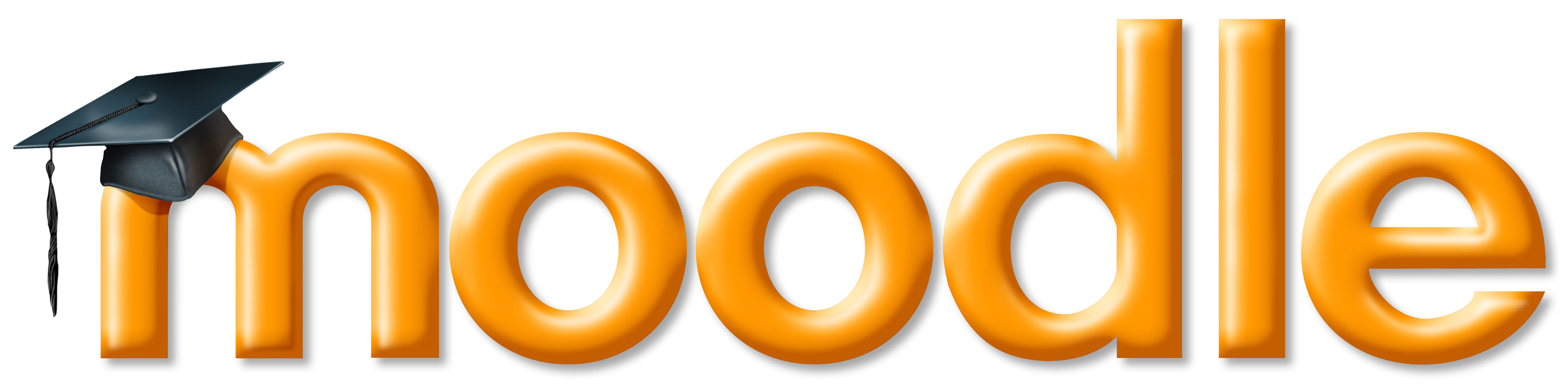 Logo de Moodle